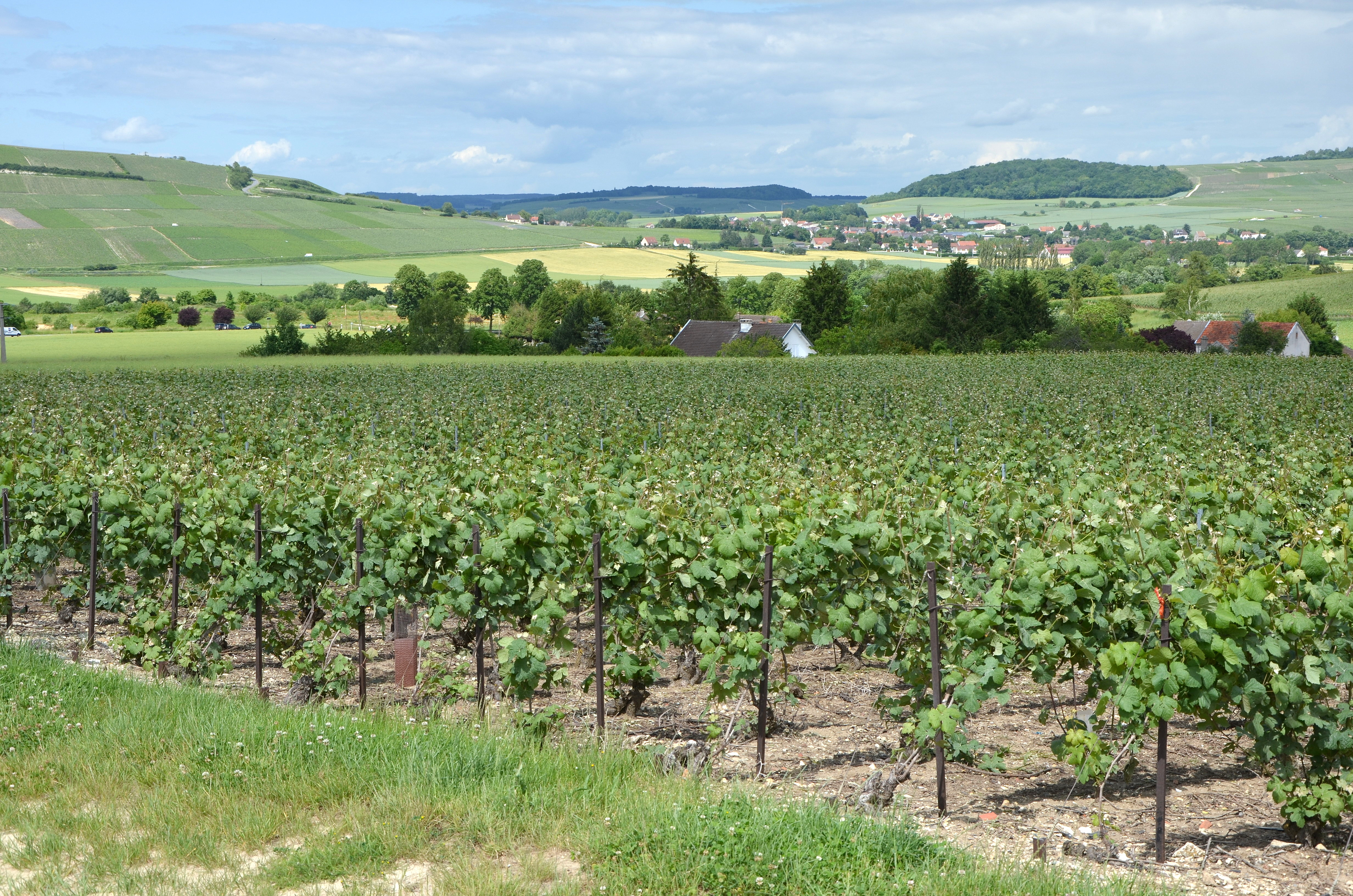 Verneuil au loin, Marne, France